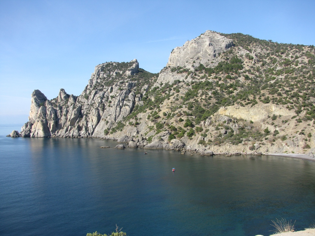 Вид из мыса Капчик.